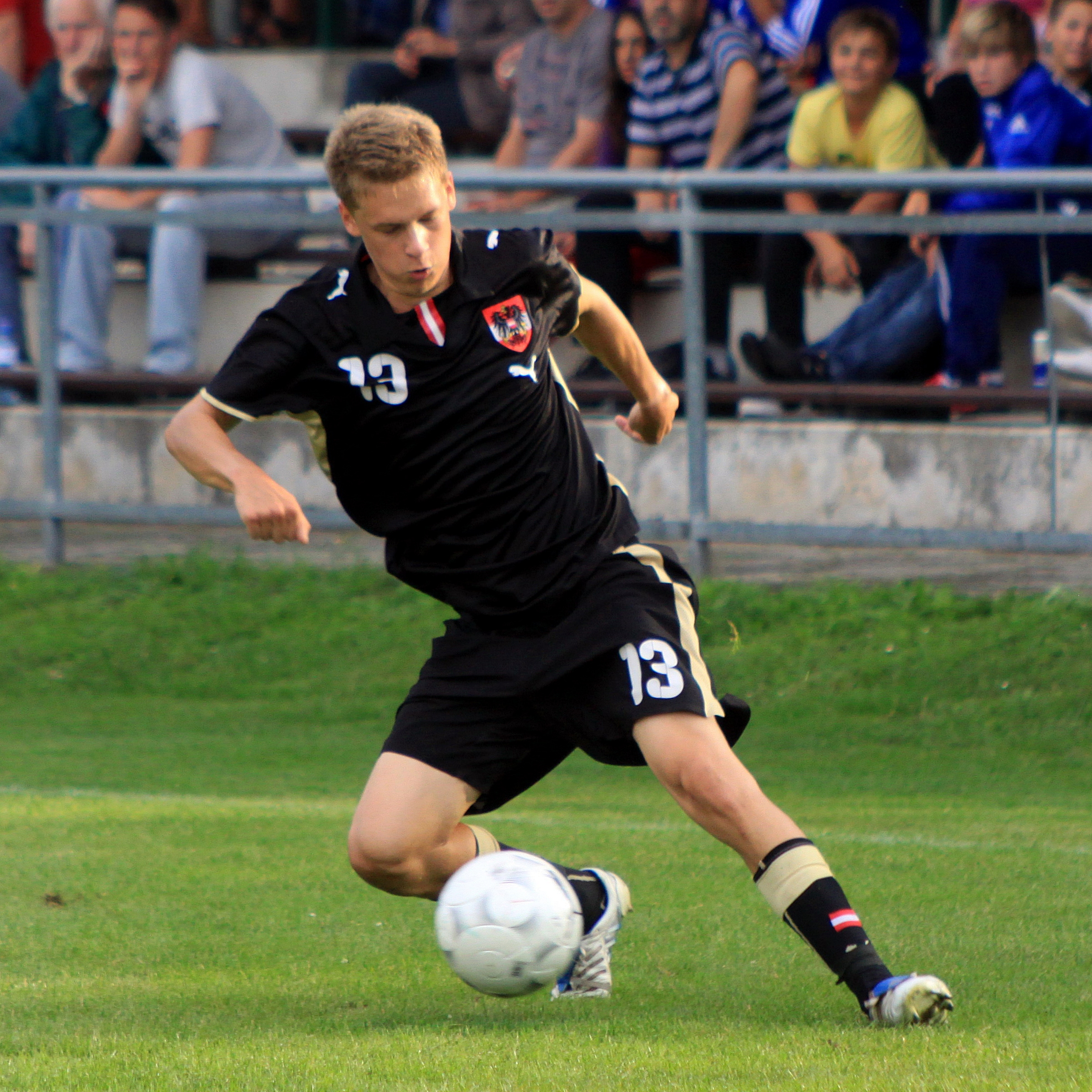 Julian Erhardt (SC Rheindorf Altach) - Österreichische Fußballnationalmannschaft (U-19-Männer)